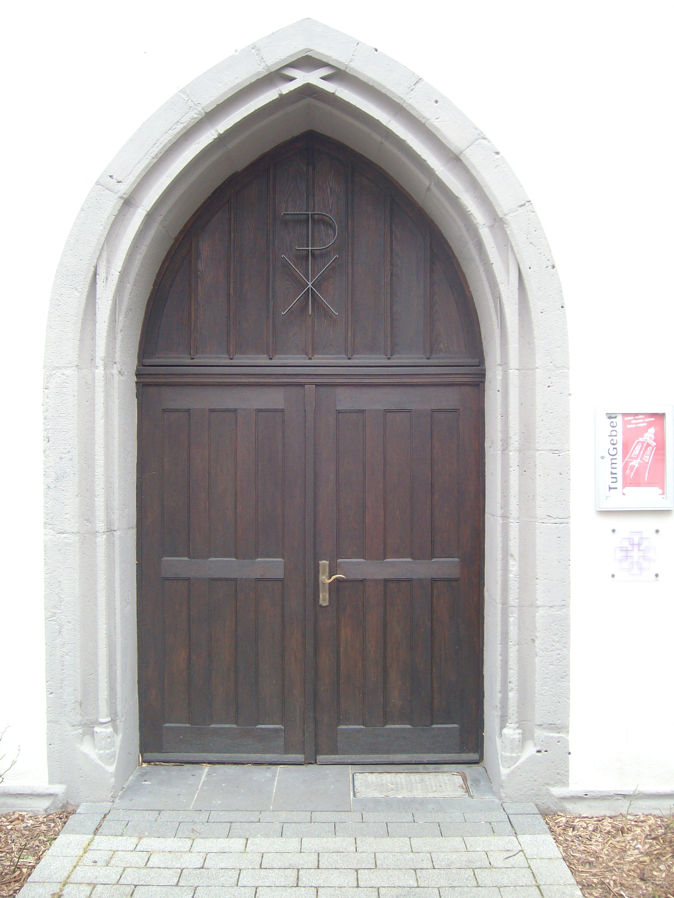 Westportal des Stadtkirchenturms Gießen, Hessen, Deutschland